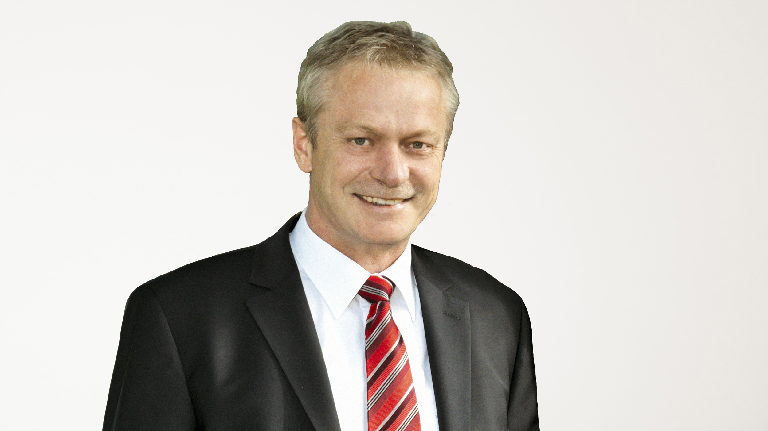 Alois Rainer, MdB (2013)